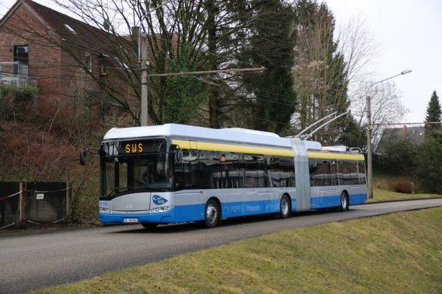 Solaris/Kiepe Trollino 18,75 Wagen 861 noch ohne Zulassung bei der Präsentation durch die Stadtwerke Solingen GmbH